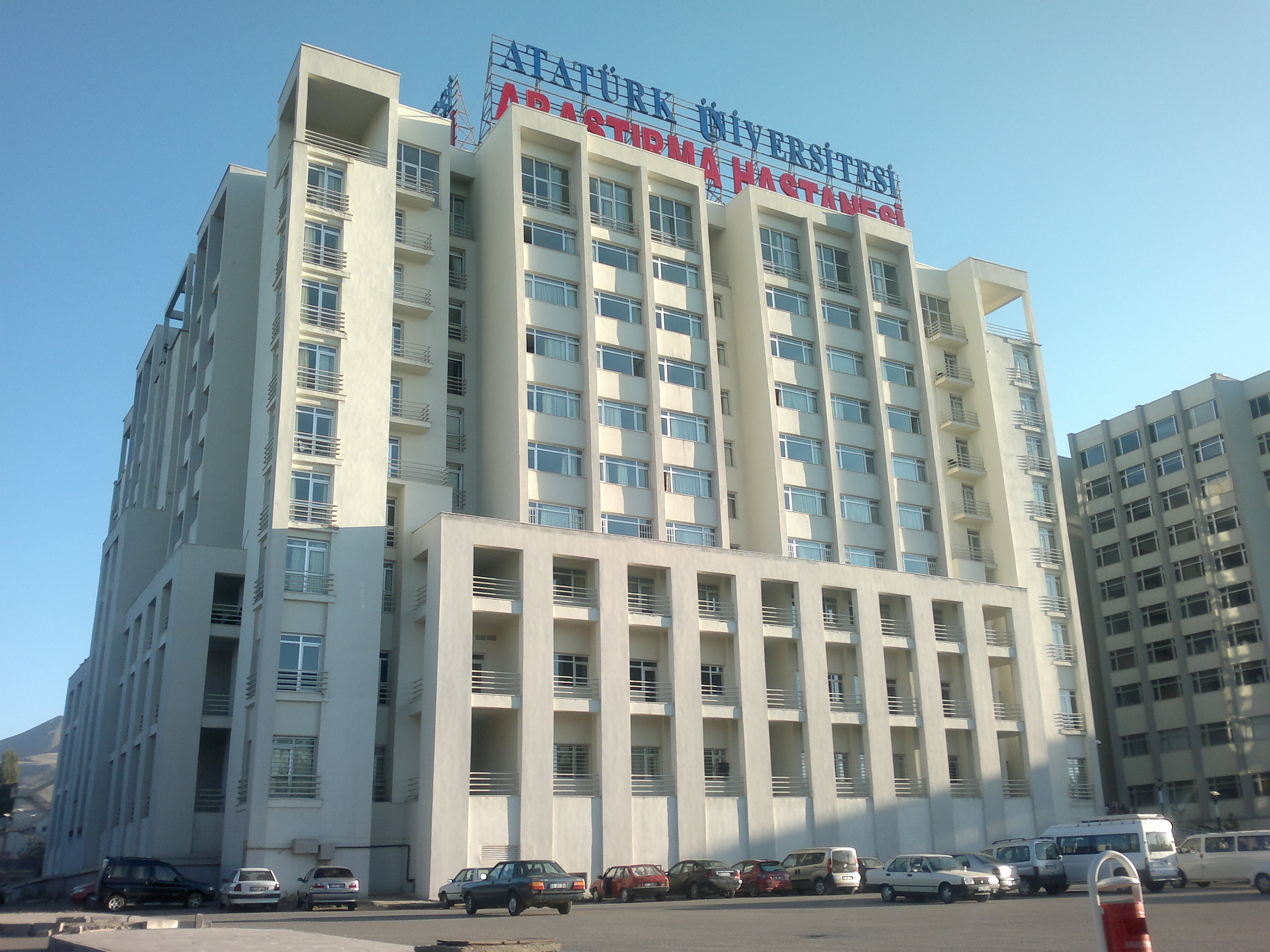 Erzurum Atatürk Üniversitesi Araştırma Hastanesi